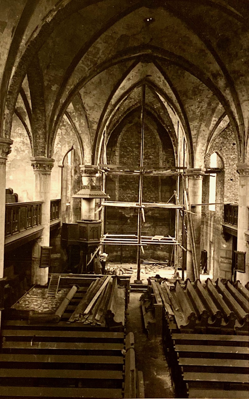 Zerstörte Christuskirche 1948 (Archiv Gemeinde)